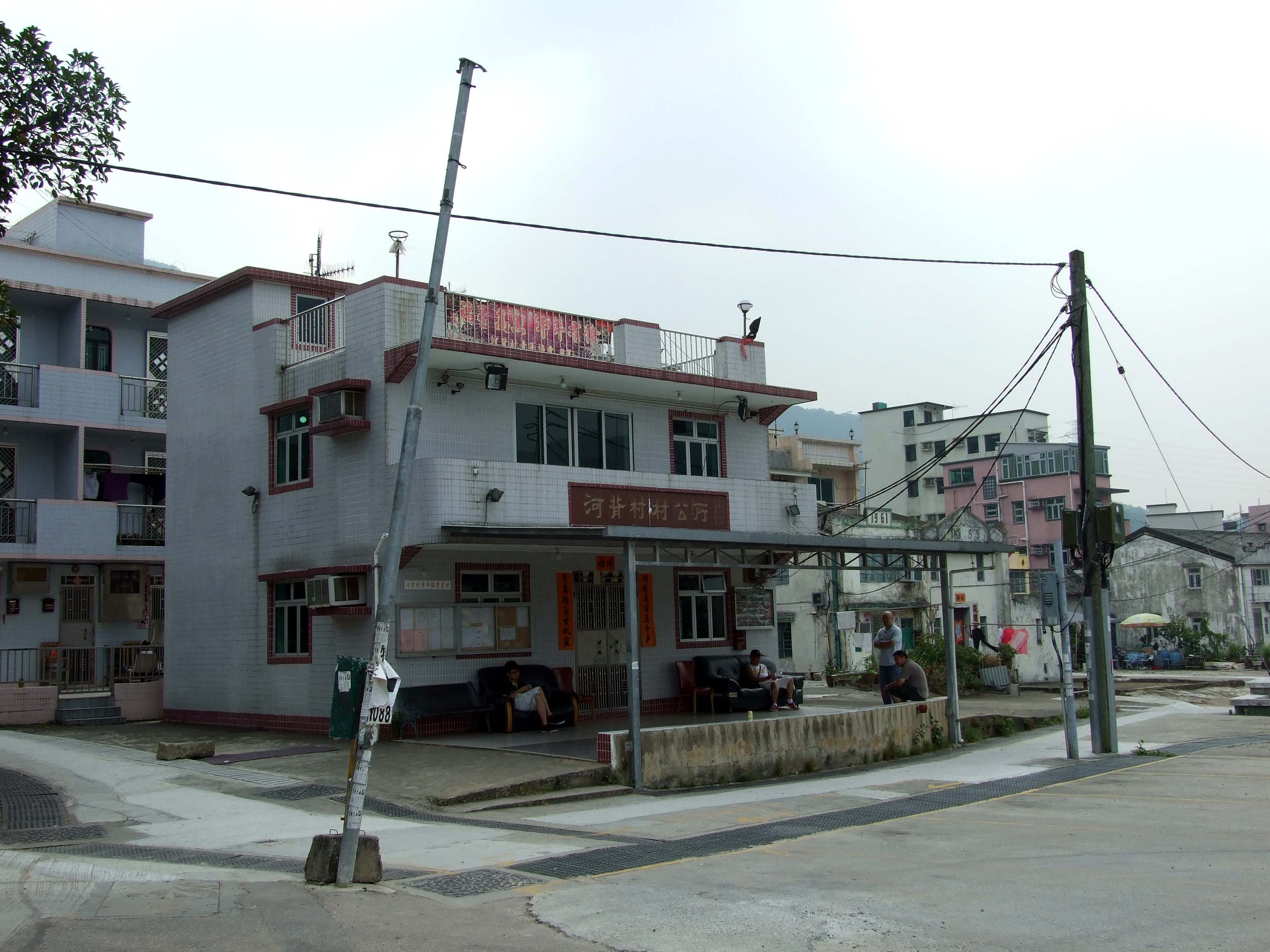 中文（香港）: 河背村村公所